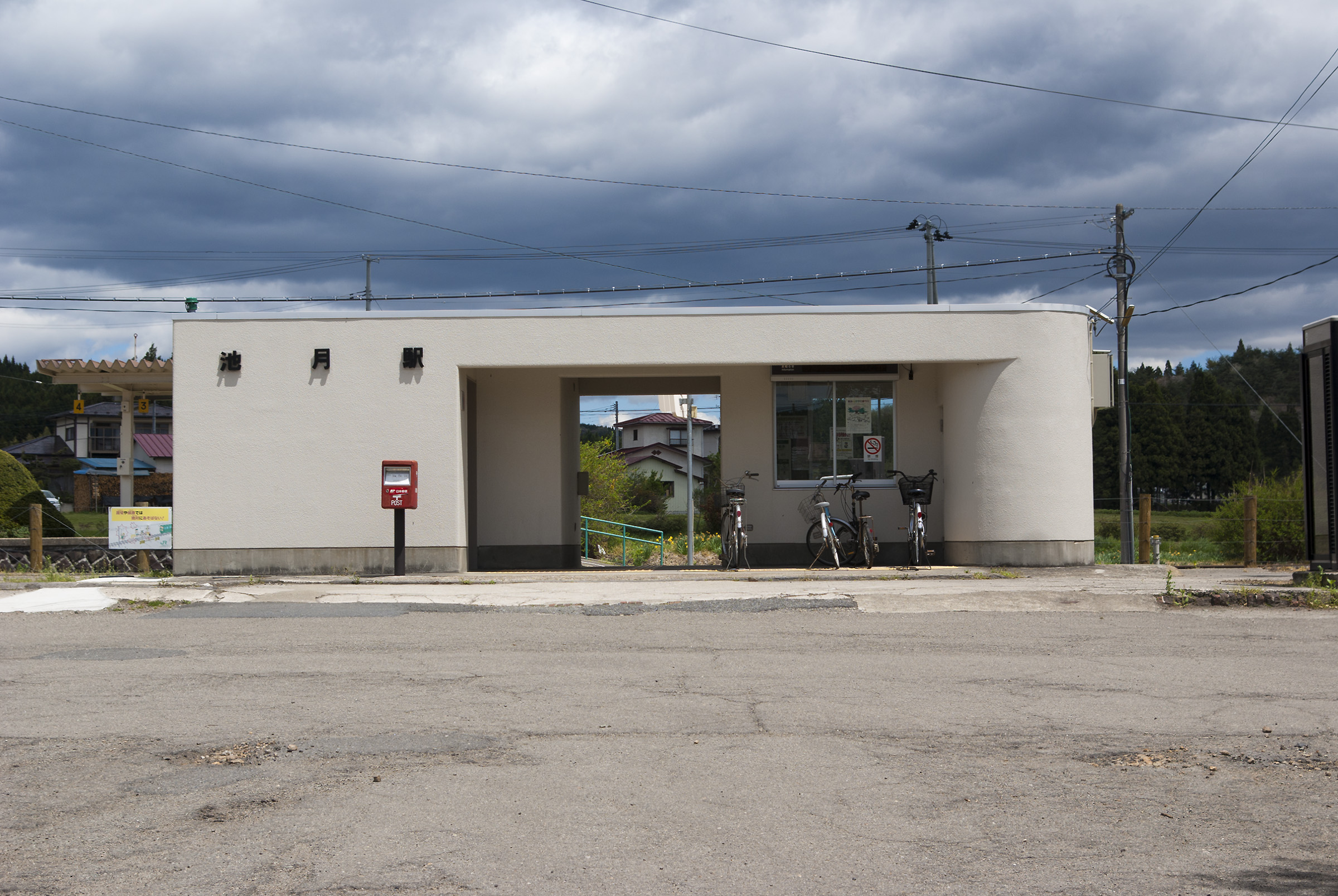 東日本旅客鉄道株式会社陸羽東線池月駅駅舎